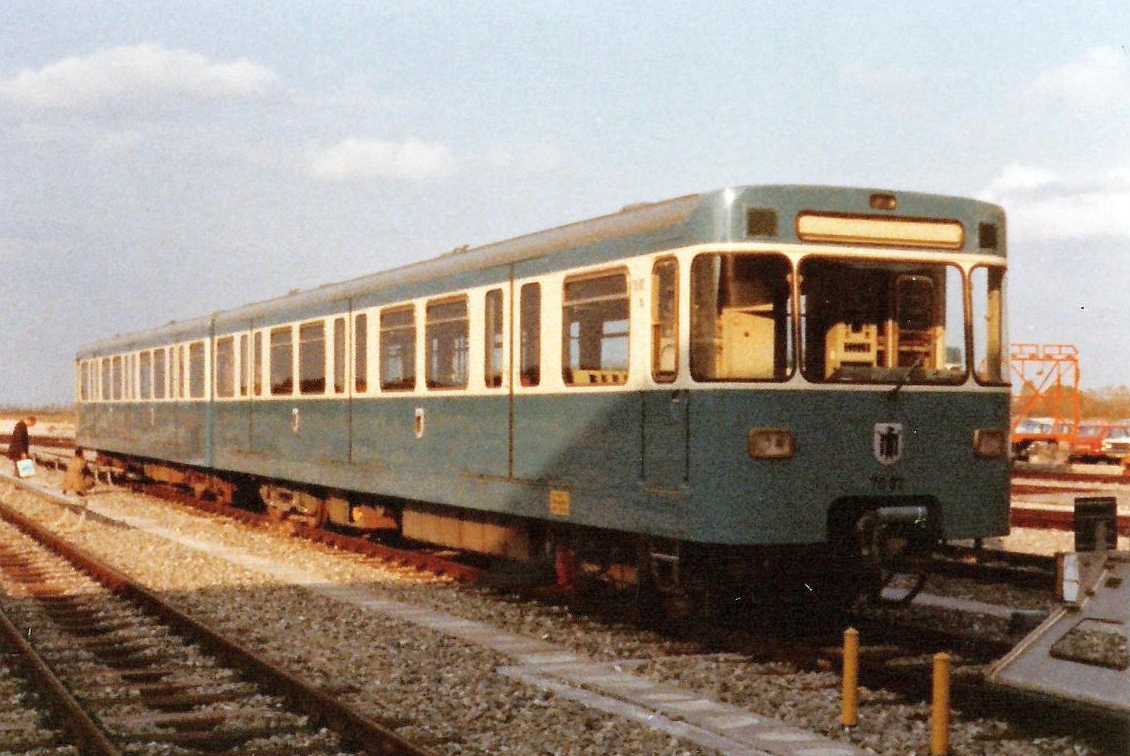 U-Bahnwagen München Typ A2 Oktober 1971.